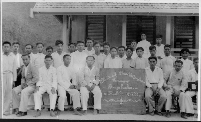 Leden van de 'Toradjasche Christelijke Jongelieden Vereeniging "Boenga Lalan"' voor de pastorie te Malaboh, Toraja, Sulawesi.